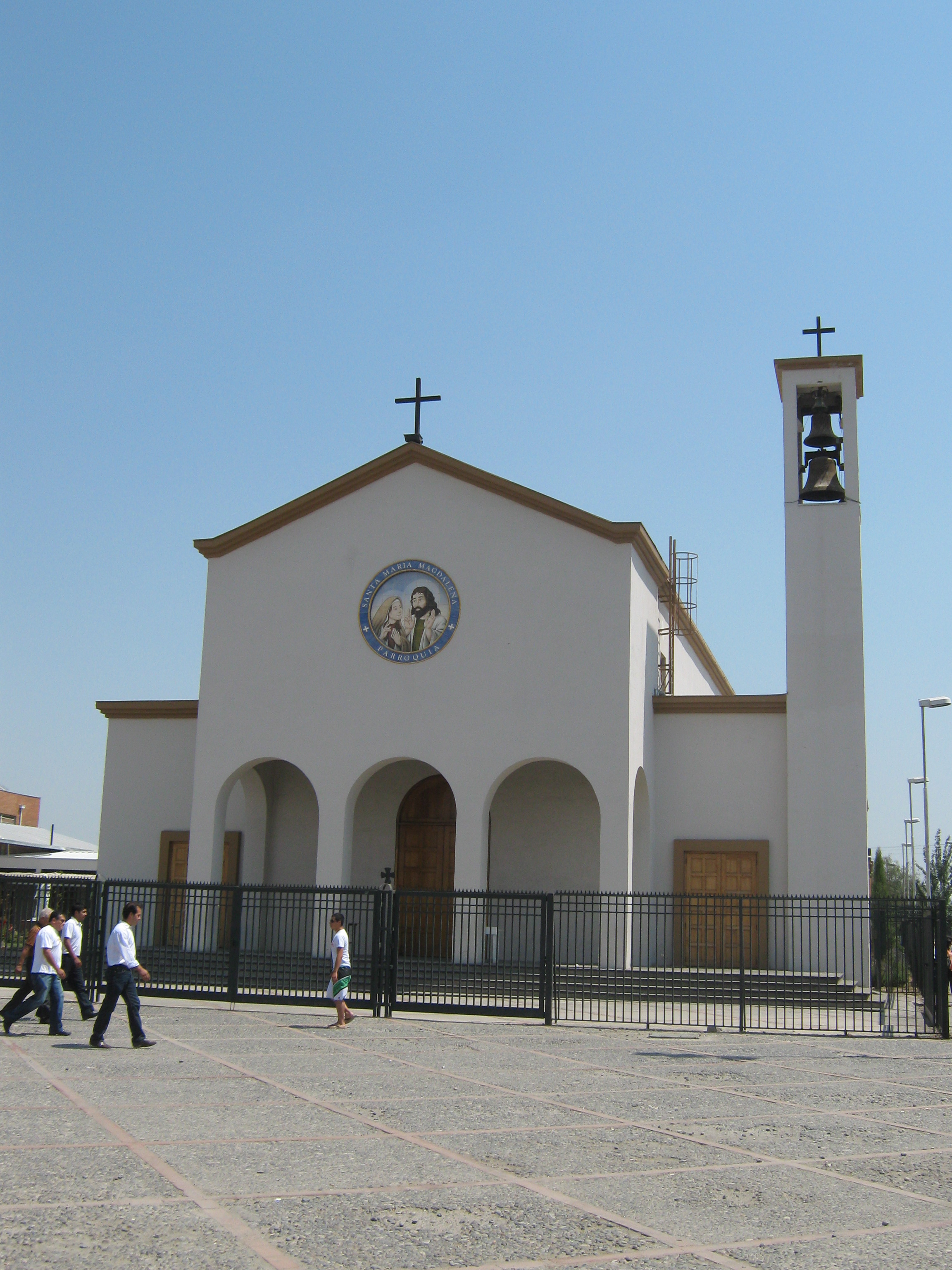 PArroquia M Magdalena Srgto.Menadier, Puente Alto